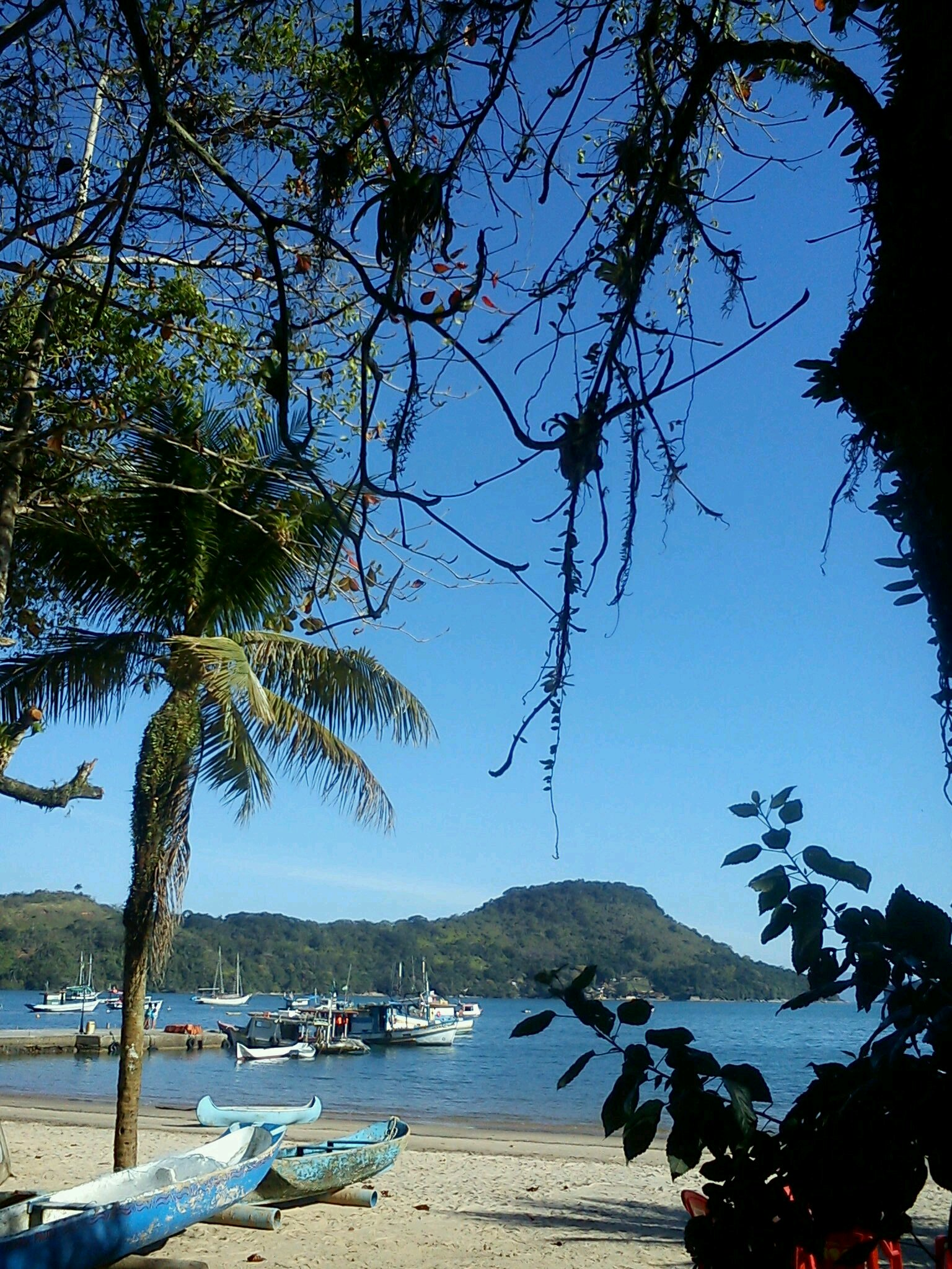 Ângulo a partir da Rua da Praia